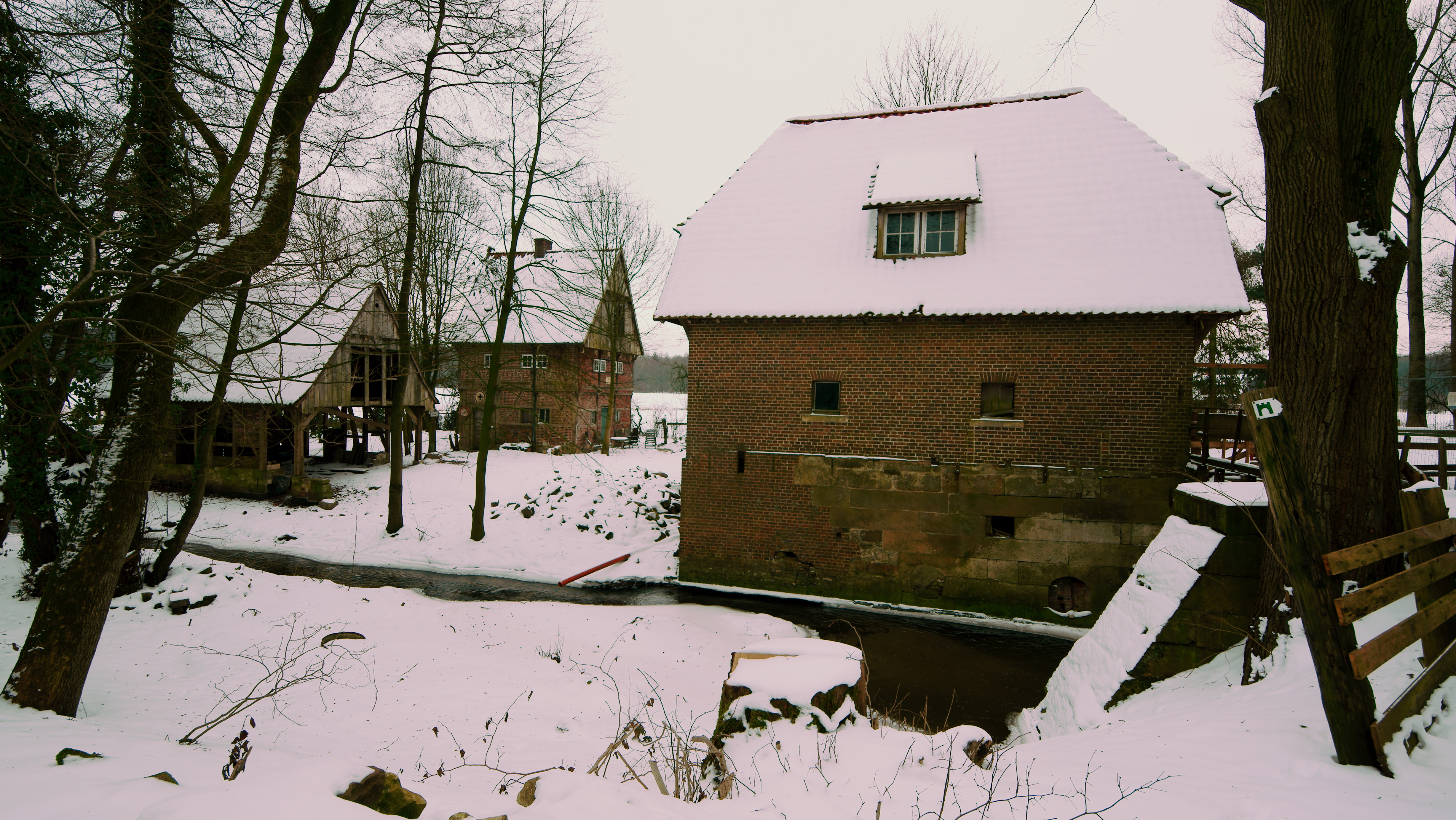 Die Burloer Mühle ist einer der wenigen von Kloster Kleinburlo erhaltenen Gebäude. Sie liegt zwischen Darfeld und Eggerode (Kreis Coesfeld, NRW) am Burloer Bach, einem Zufluss der Vechte.